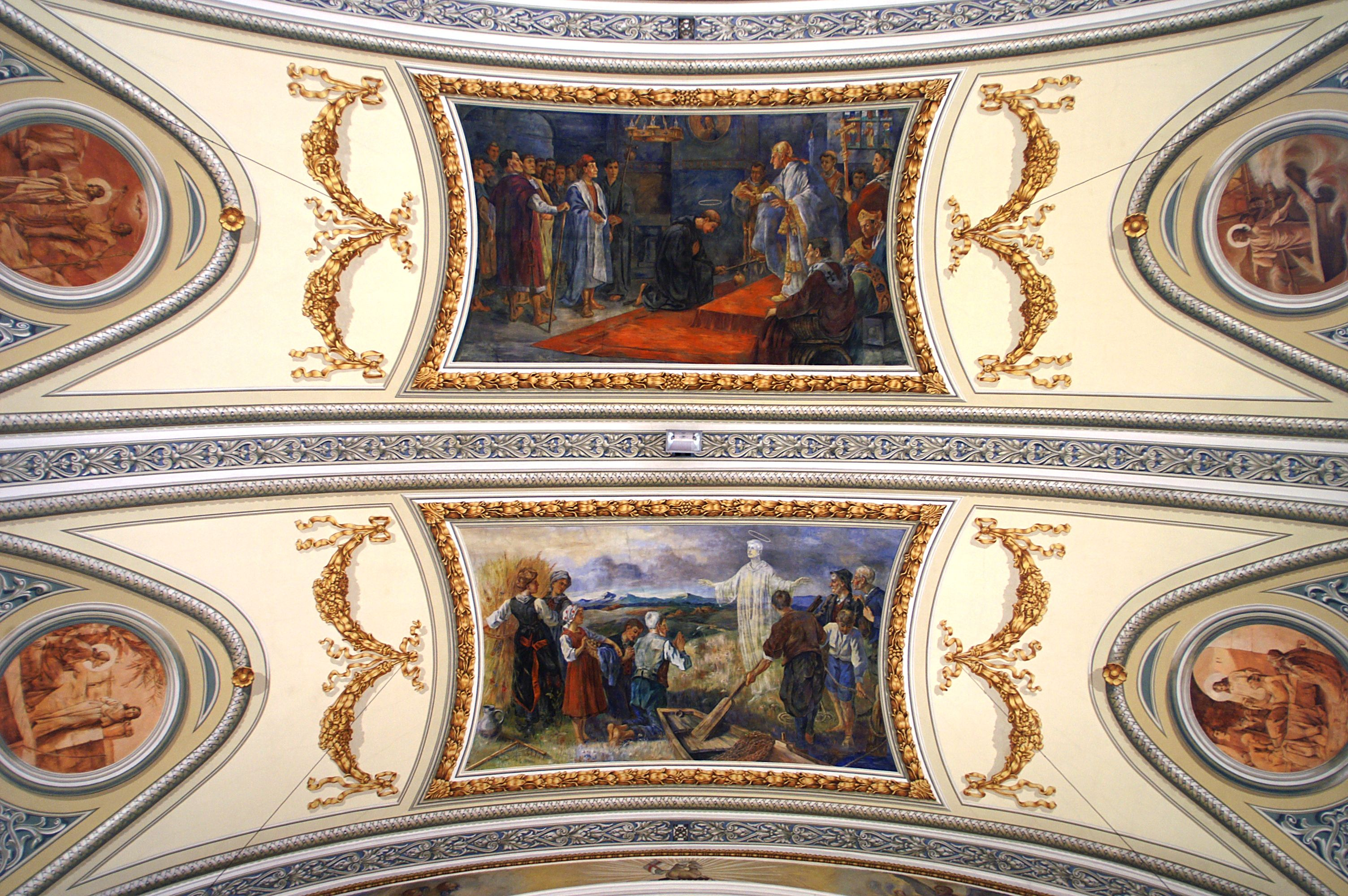 Pfarrkirche St. Jodok, Bilder von Hans Bertle: „Begegnung mit dem Papst“, „Als Patron der Landleute“ (1905-1907) in Schruns, Montafon